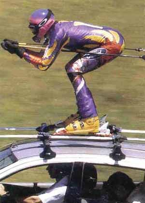 Downhilltraining.